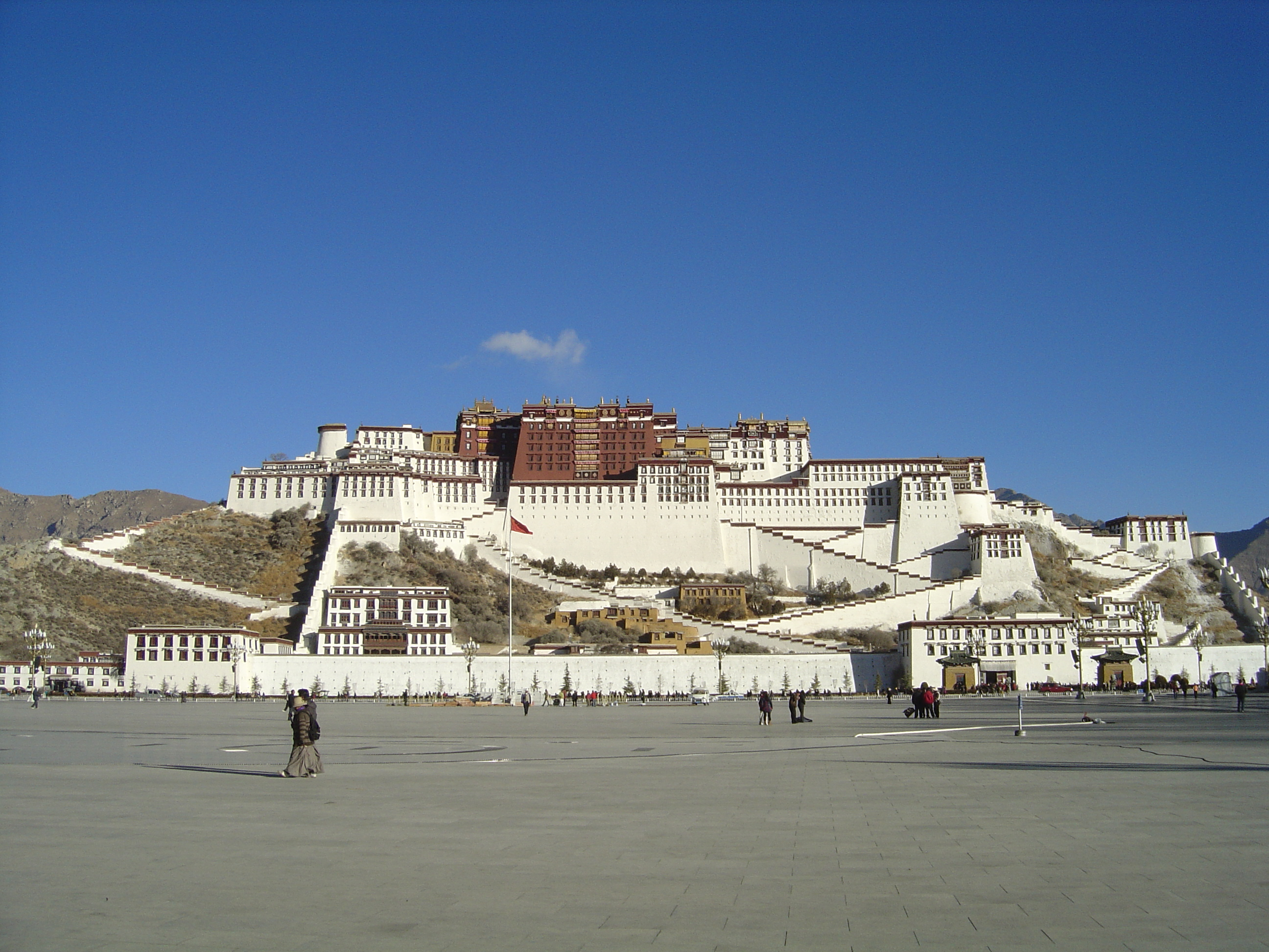 Potala